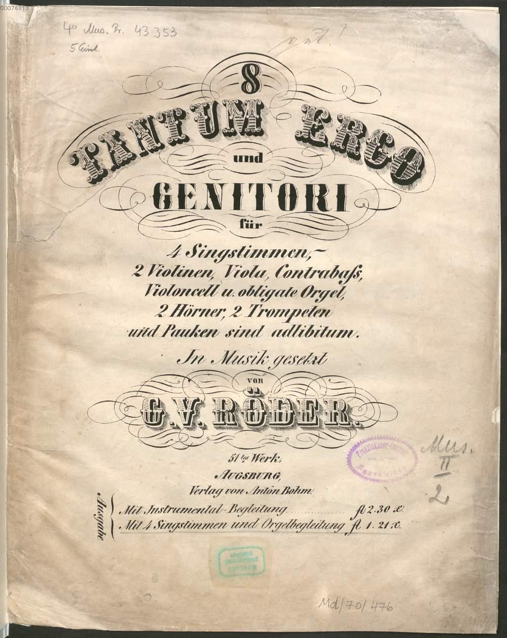 Composition by Georg Valentin Röder 1820